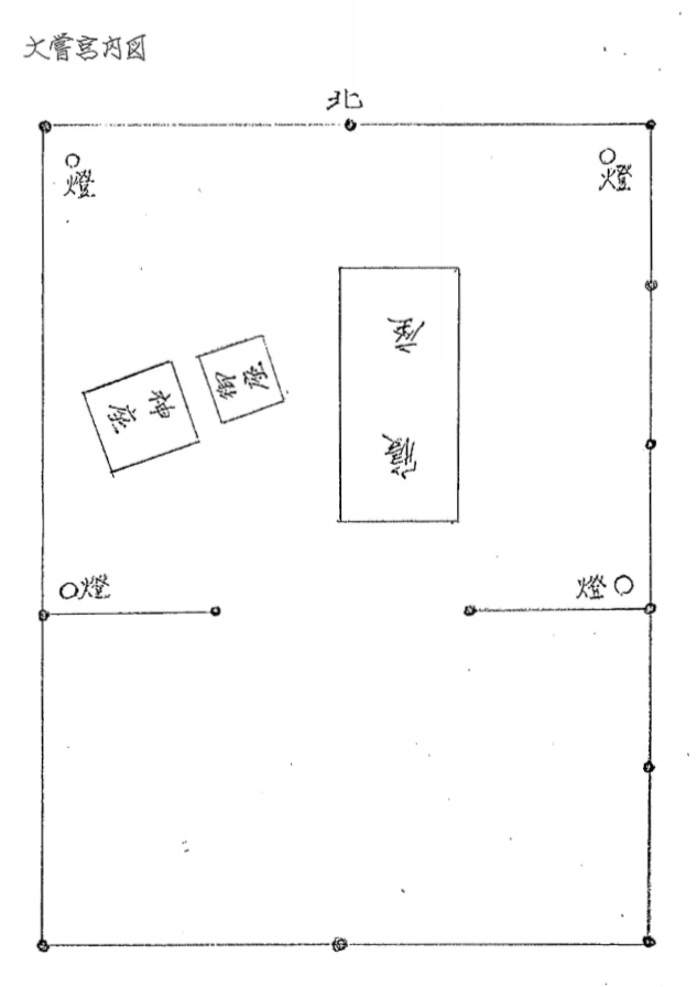 大嘗宮内図